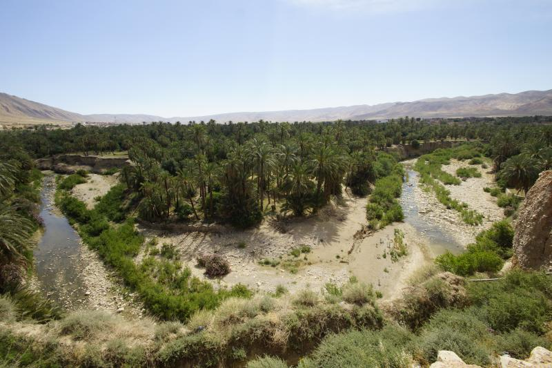 El Kantara